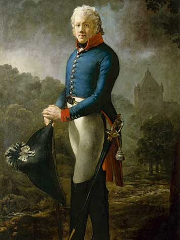 Carl Adolf von Carlowitz, Herr auf Großhartmannsdorf und Liebstadt. Rechts im Hintergrund ist Schloss Kuckuckstein zu sehen. Der untere Teil des Gemäldes entspricht nicht mehr dem Original. Bei Johann Georg Meusel heisst es: "stützt sich mit beiden Händen auf den Degenkorb". Der jetzt sichtbare von einem späteren Restaurator gemalte Degen sitzt also falsch.